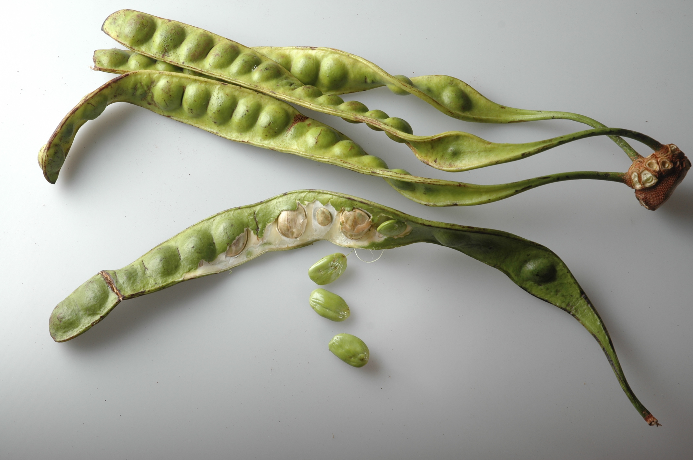 Parkia speciosa, Indonesia: petai